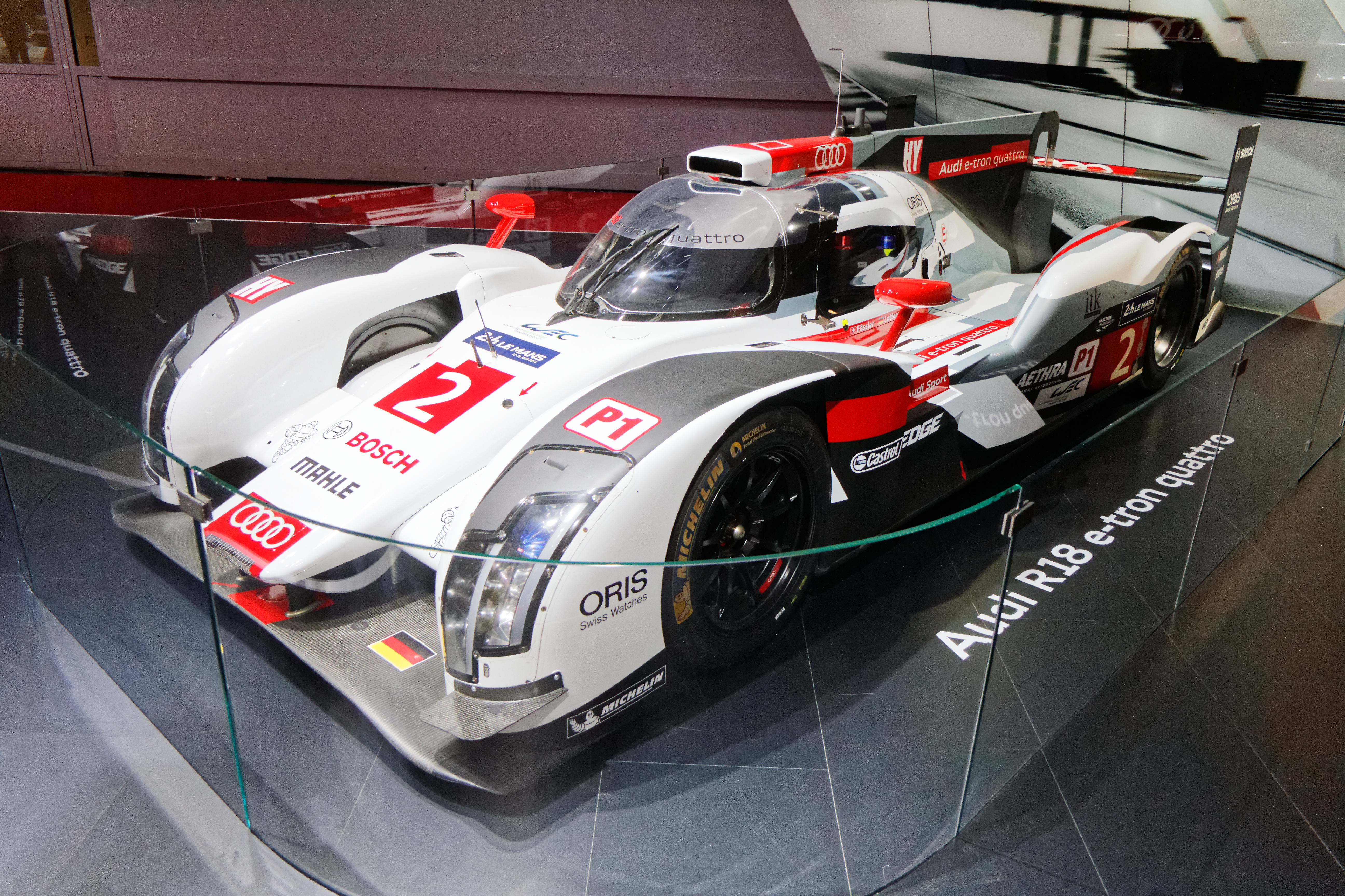 Une Audi R18 e-tron quattro lors du mondial de l'automobile de Paris 2014.